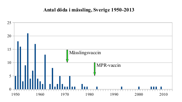 Antal döda i mässling i Sverige 1950 - 2013. Dödligheten minskade rejält redan innan vaccination infördes, och blev i princip noll på 1980-talet. Under 2000-talet har dödligheten ökat något. Uppgifter från Sveriges officiella statistik, publikationen Dödsorsaker, utgiven av Statistiska centralbyrån till 1993, från 1994 av Socialstyrelsen.